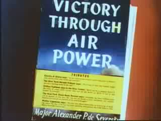 Imatges del tràiler de la pel·lícula "Victory Trough Air Power". Els tràilers de les pel·lícules publicats abans de 1964 als Estats Units es troben en domini públic